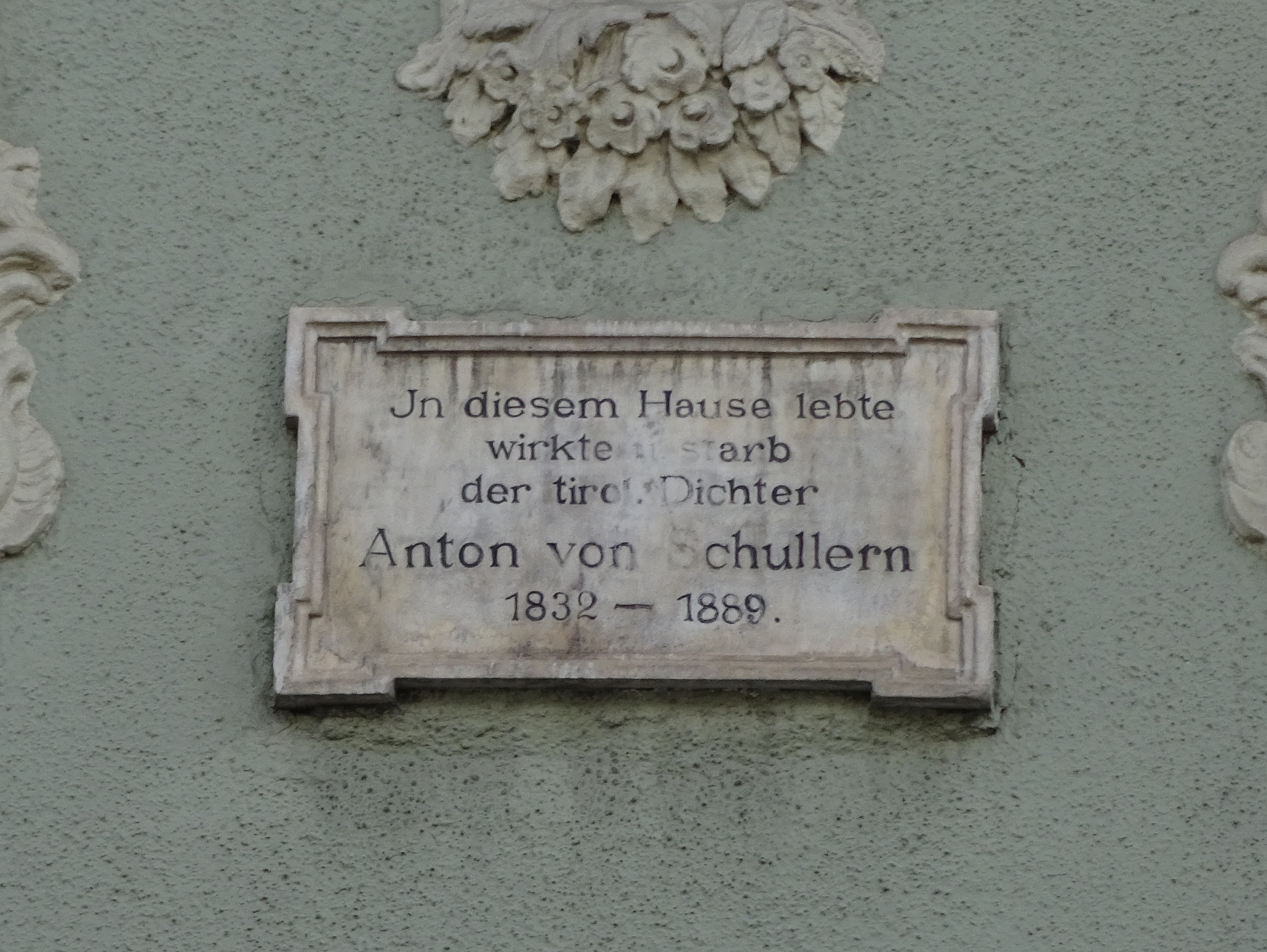 Gedenktafel für Anton von Schullern am Haus Burggraben 4, Innsbruck